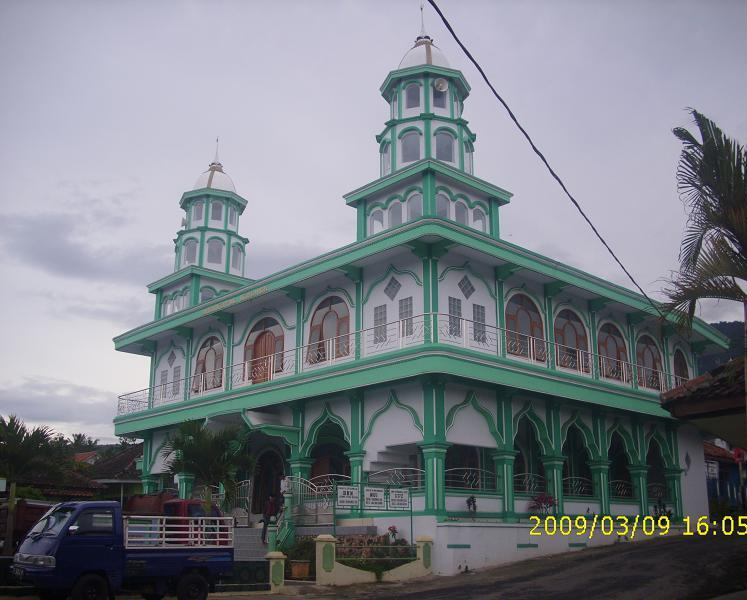 Mesjid Sidamulya setelah direnovasi